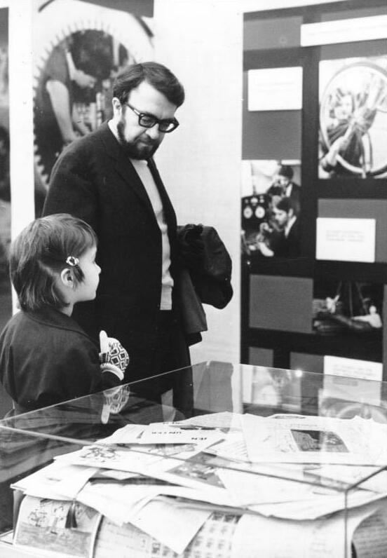 Berlin, Vietnam-Ausstellung, Besuch Kieling ADN-ZB / Brüggemann, 30.2.1968 Berlin: Vietnam - Ausstellung Der Schauspieler Wolfgang Kieling, besuchte mit seiner Tochter Anett am 20.3.1968 die Vietnam-Ausstellung in der Berliner Friedrichstrasse. Er informierte sich über die Solidaritätsbeweise der Bevölkerung der DDR für das heldenhaft kämpfende vietnamesische Volk. Abgebildete Personen: Kieling, Wolfgang: Filmschauspieler, DDR (PND 118821539)